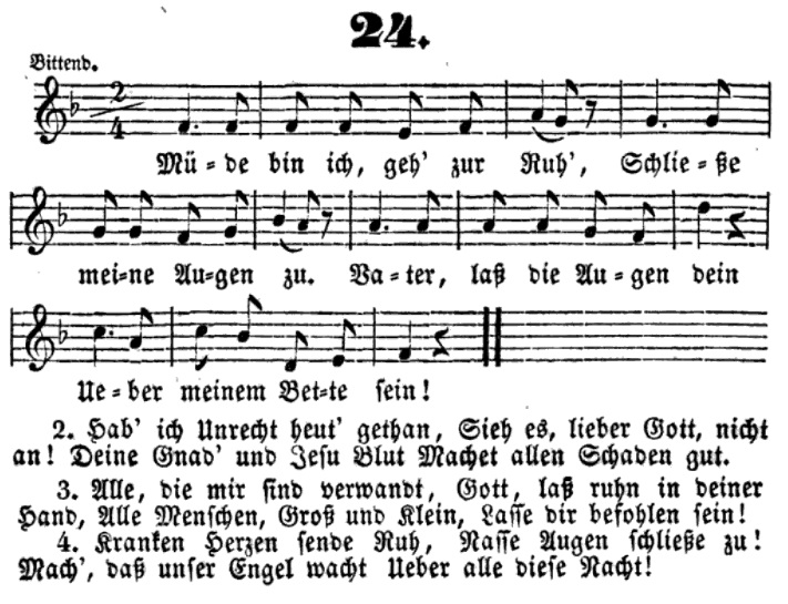 Müde bin ich, geh zur Ruh im Kaiserswerther Kinder-Liederbuch 1842